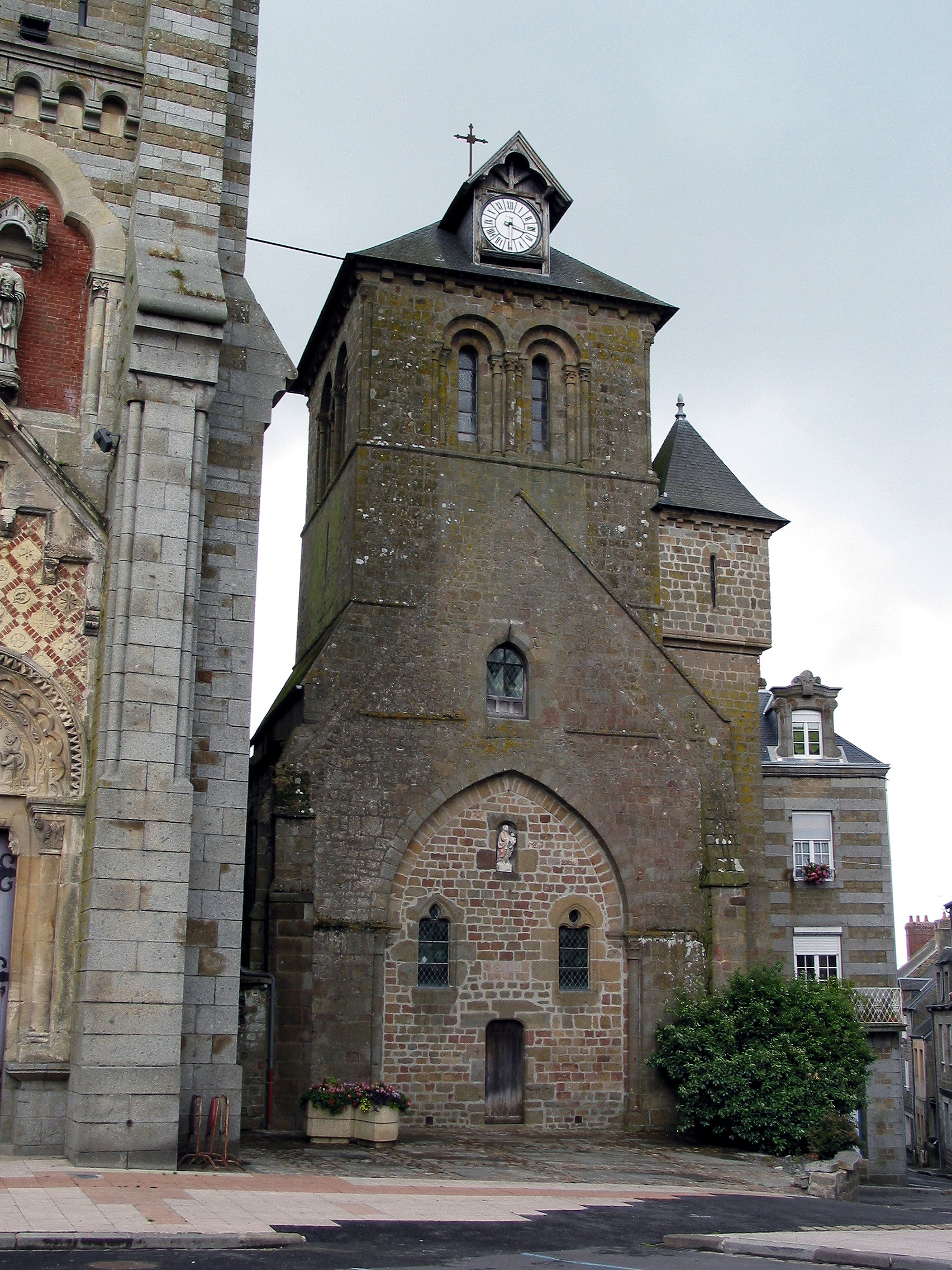 L'ancienne église de La Ferté-Macé, datant du XIe siècle, est située au centre-ville.